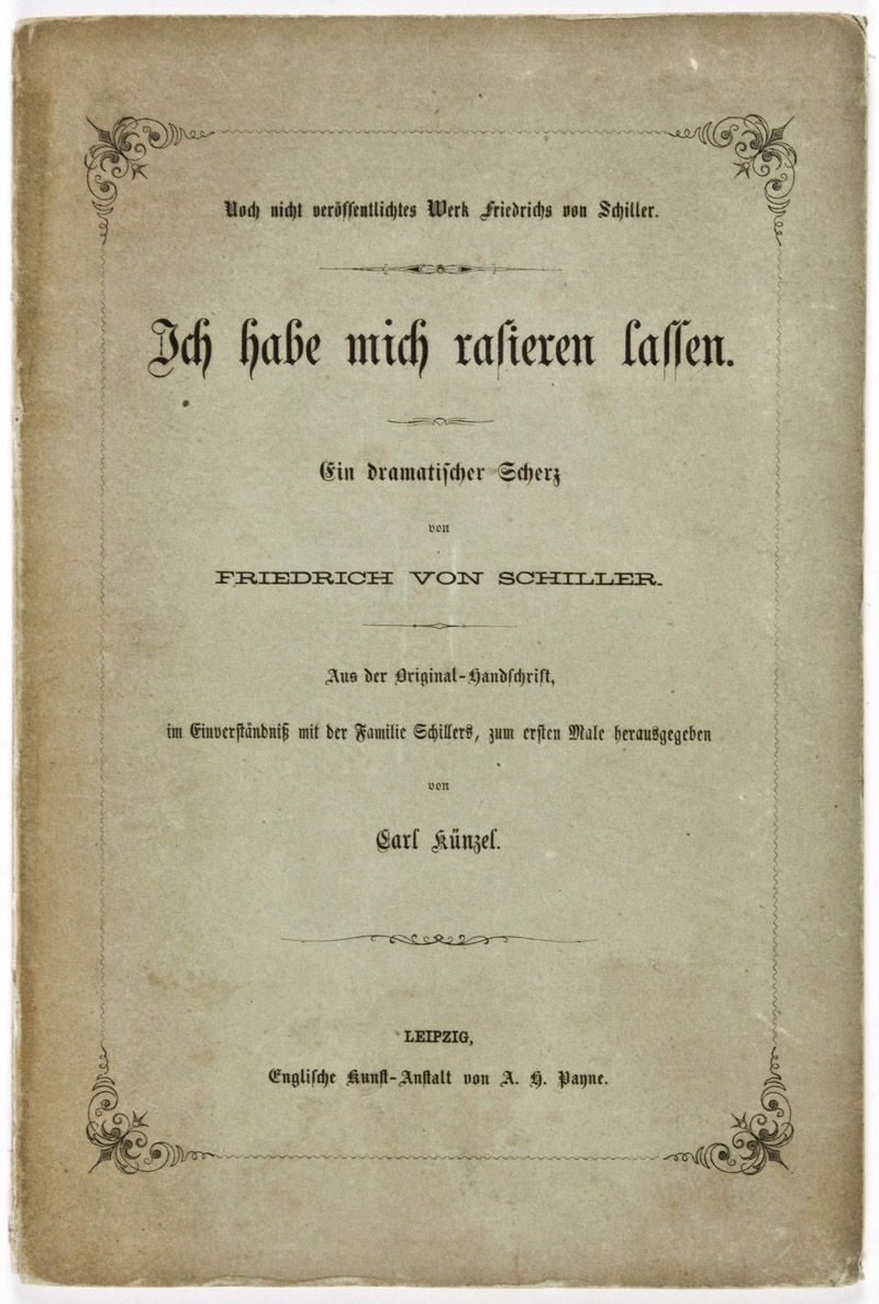 Titelblatt von: Ich habe mich rasieren lassen: Ein dramatischer Scherz von Friedrich von Schiller, Verlag der Englischen Kunst-Anstalt A. H. Payne 1862